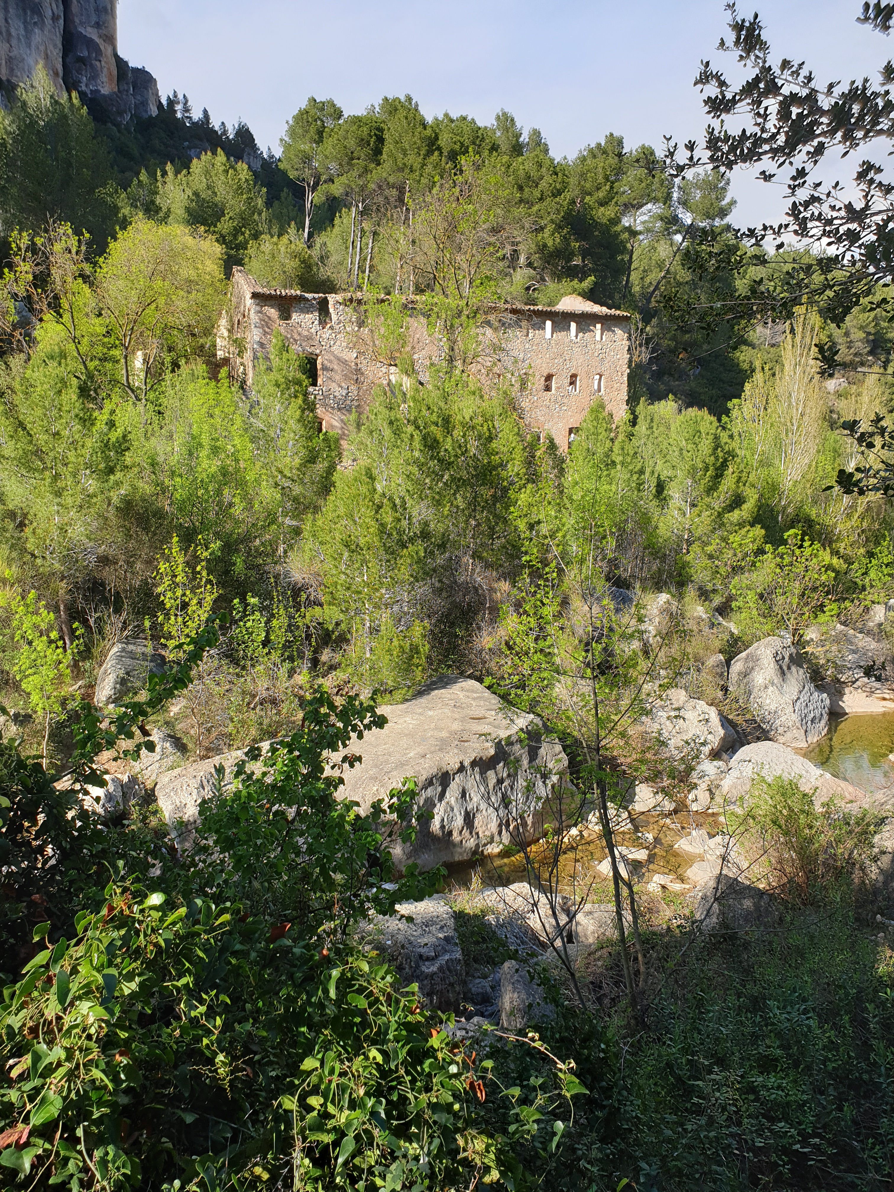 Molino de la Font Gran en el río Brugent en el municipio de Vilaverd, cerca de La Riba, en Tarragona